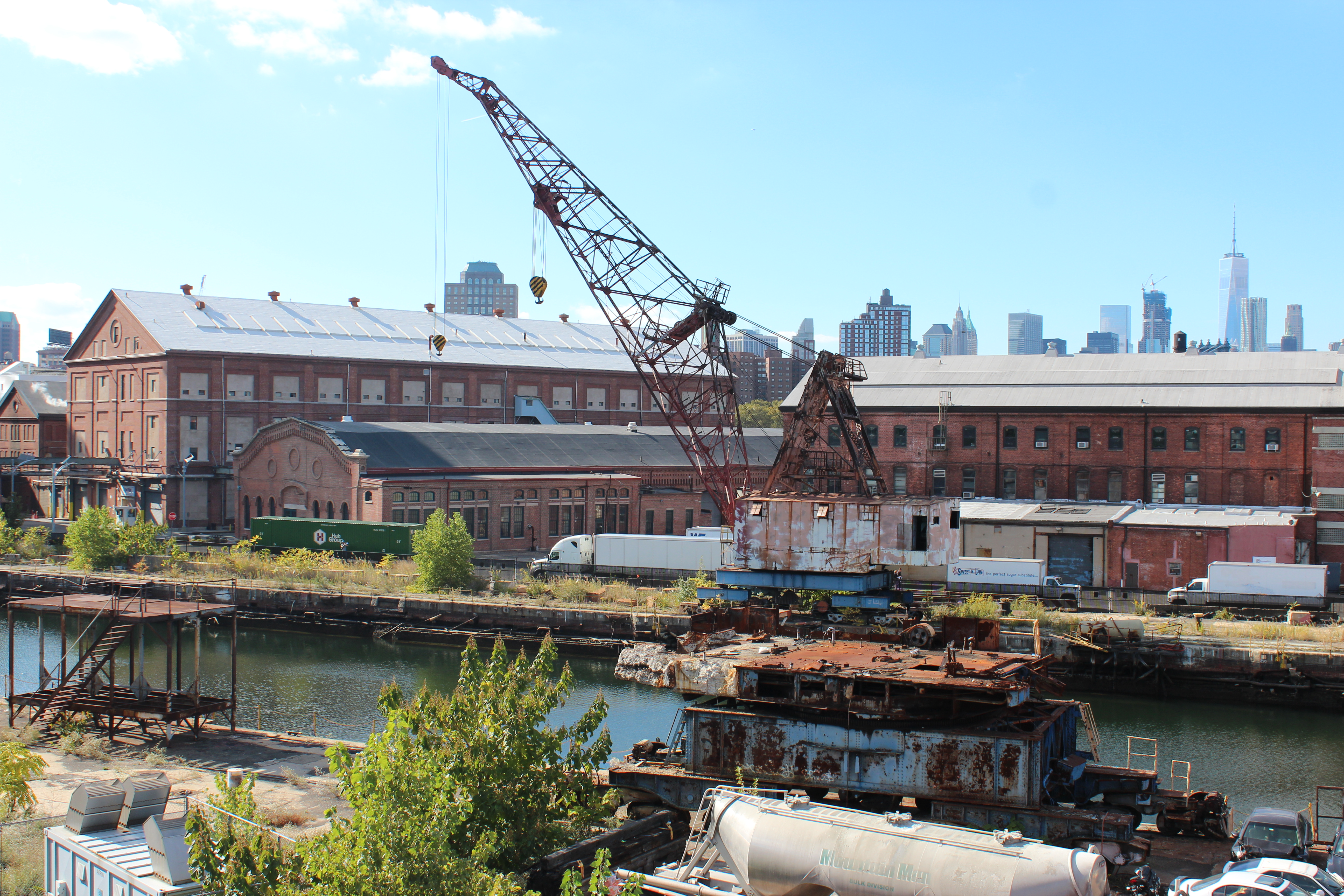 Site: Brooklyn Navy Yard